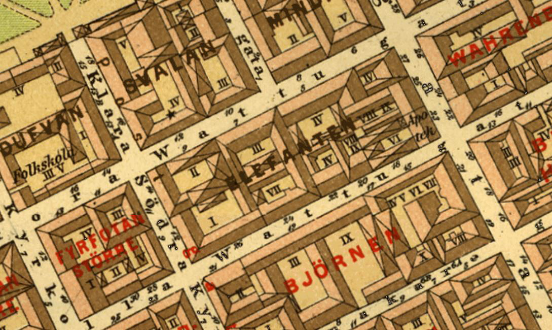 Kvarteret Elefanten på Alfred Rudolf Lundgrens karta från 1885